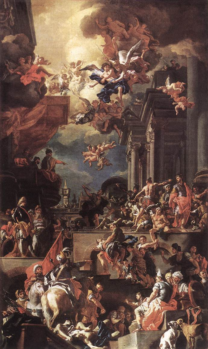 Il Massacro dei Giustiniani a Scio di Francesco Solimena è un quadro (olio su tela, cm 277 x 164) che si trova a Napoli nel Museo di Capodimonte (inv. Q 213), nella Galleria Napoletana. Il quadro è un bozzetto dell'artista per una delle tele che egli realizzò per decorare il soffitto della Sala del Consiglietto nel Palazzo Ducale di Genova, dipinti che andarono distrutti in un incendio nel 1777. Rappresenta il martirio di diciotto membri della famiglia Giustiniani in una rivolta dei Turchi contro la dominazione genovese a Scio.